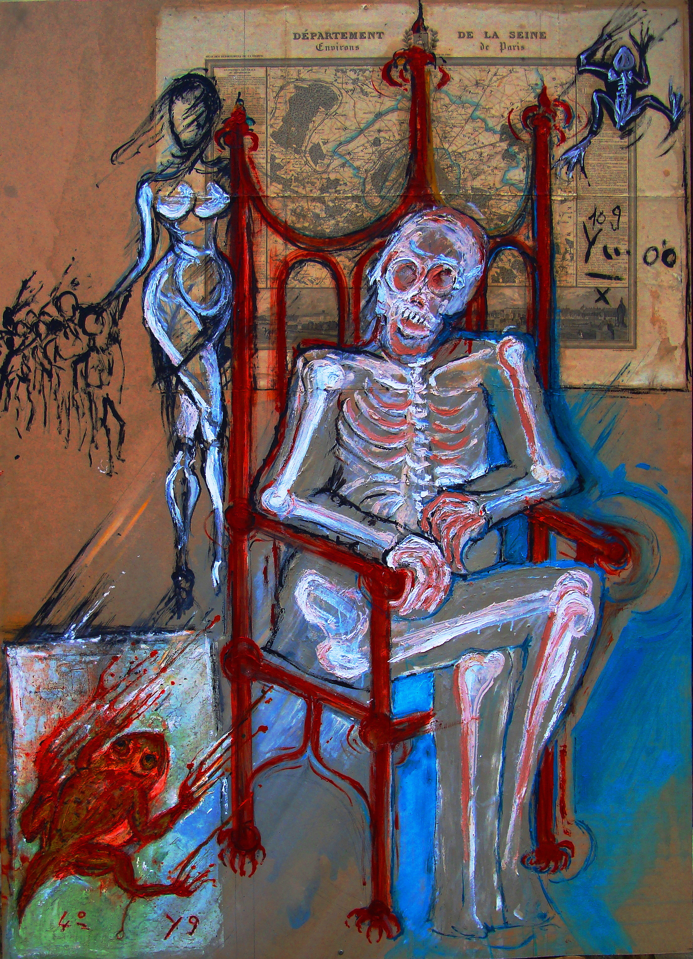 The throne of the Death VI RICHARD. Oïl on panel / 150 X 230 CM Collection privée Genève.